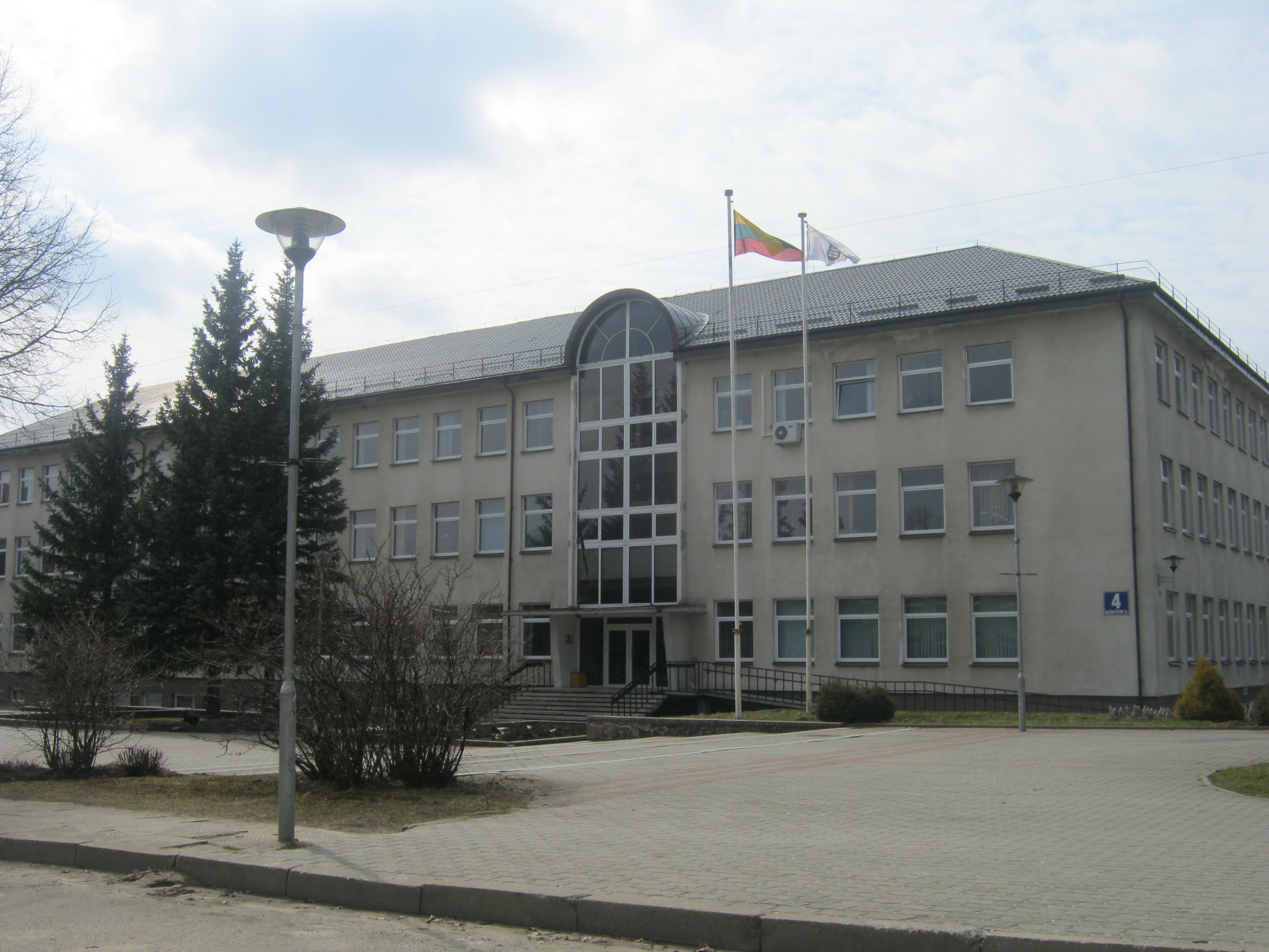 Kaišiadorių rajono savivaldybė